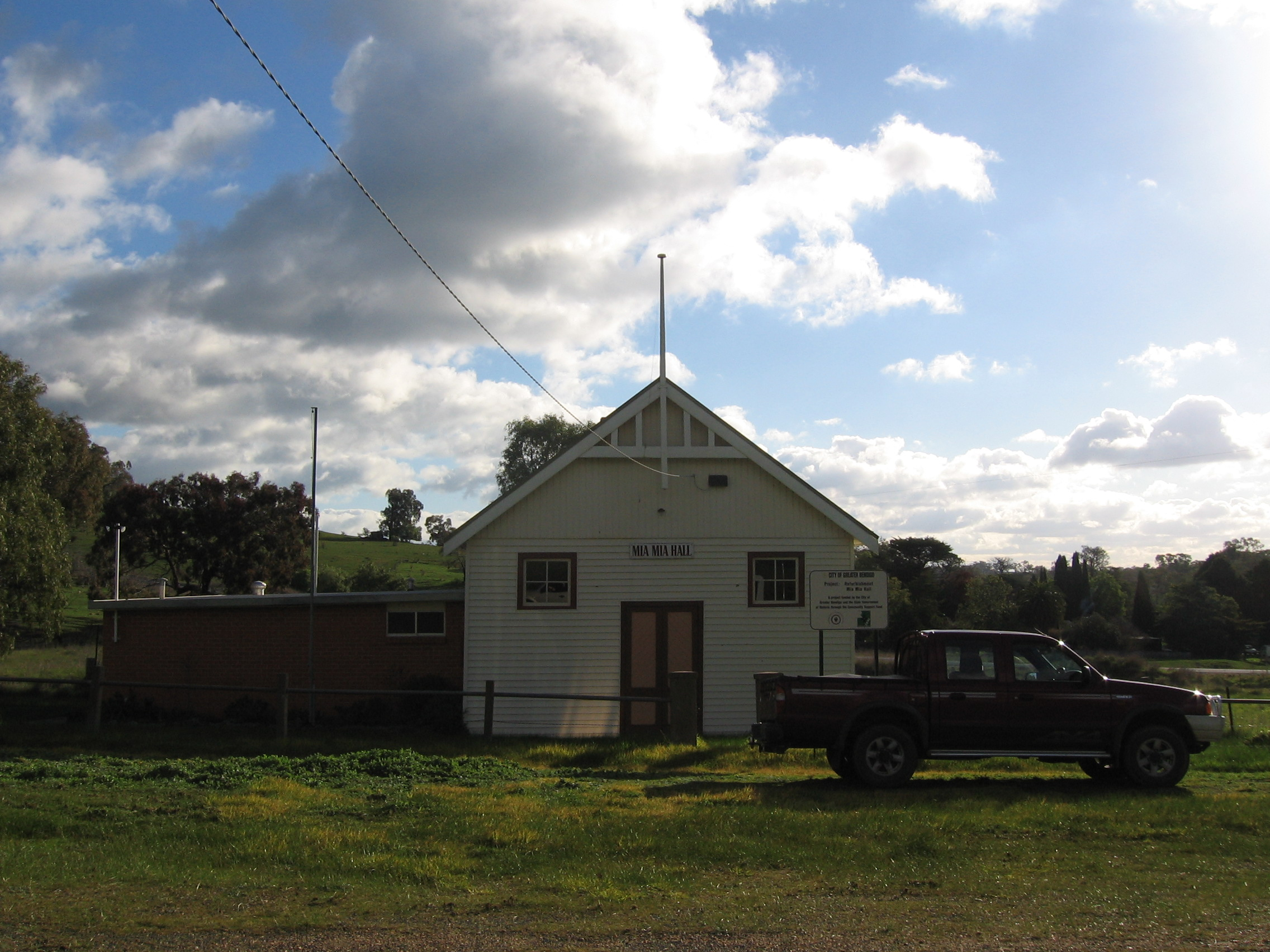 Hall at Mia Mia, Victoria